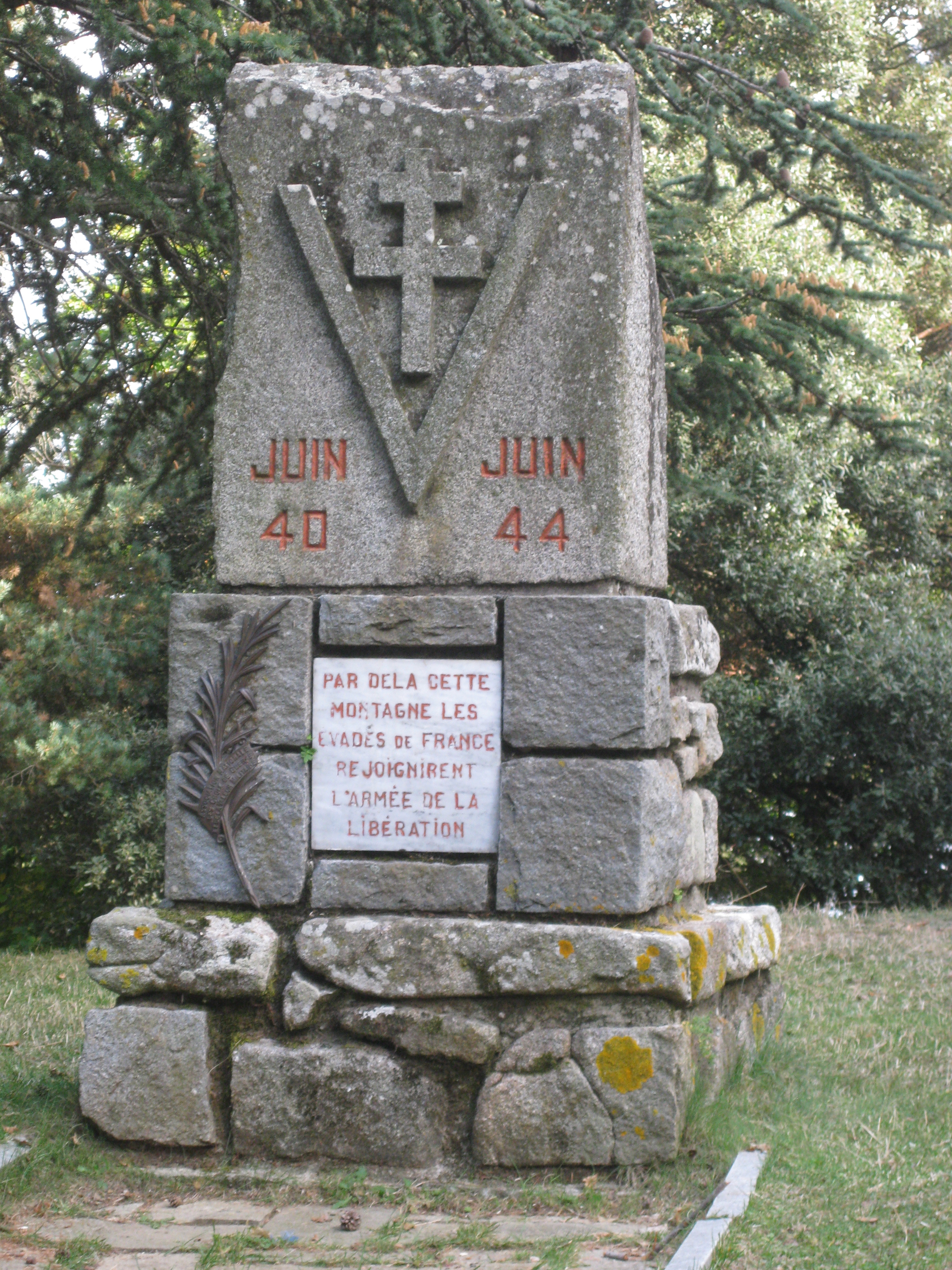 Stèle des évadés de France, Col de Fontfrède, Céret (Pyrénées-Orientales, Languedoc-Roussillon, France)